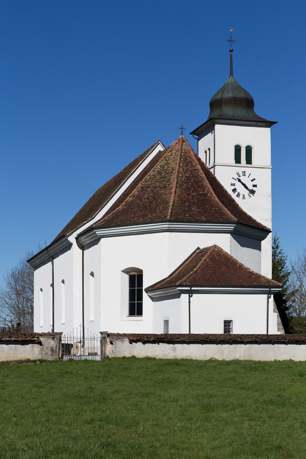 Kirche Sankt Blaise in Corban (JU)